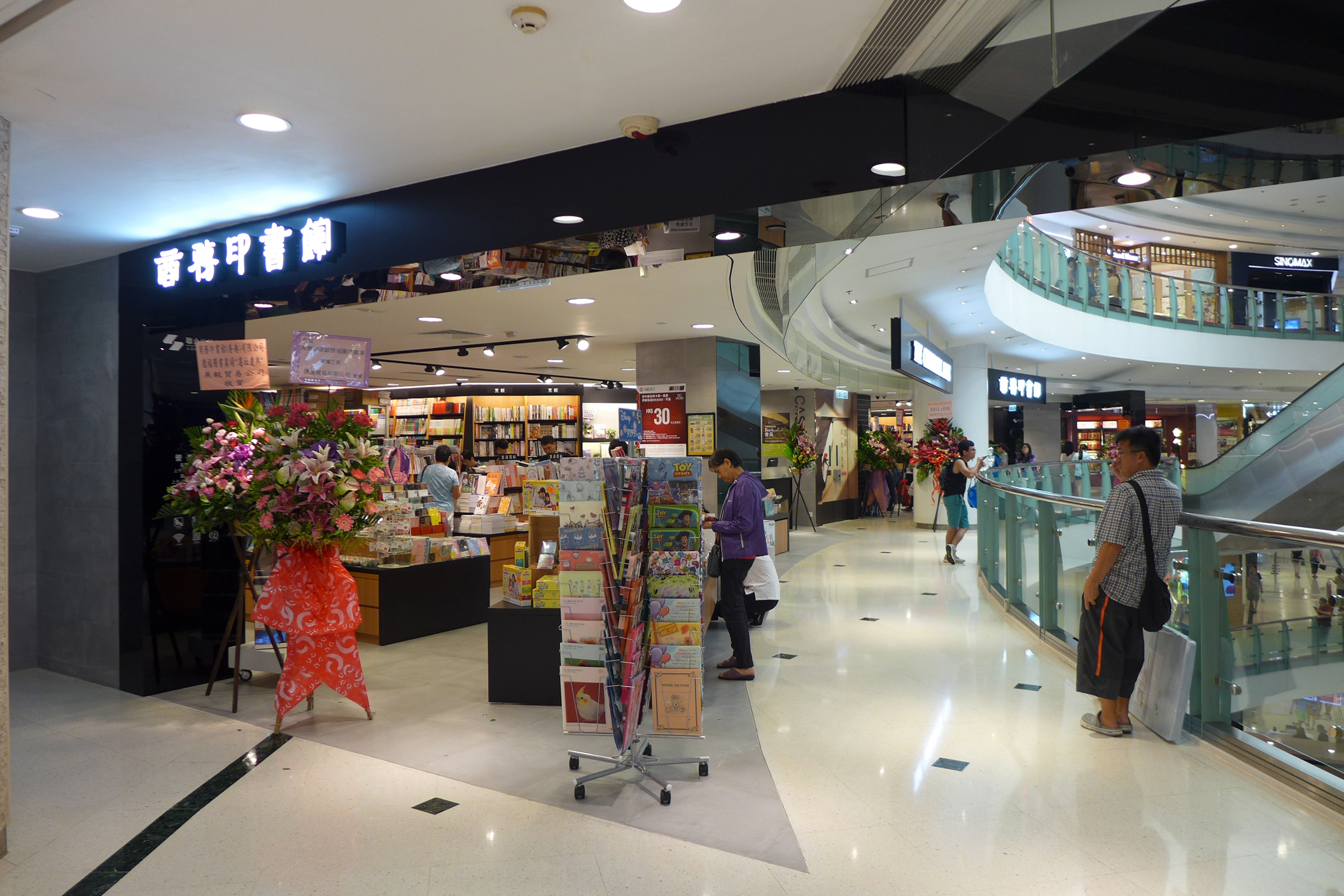 Telford Plaza Commercial Press